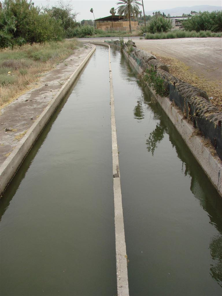 תעלות המים של משפחת וילנד - טירת צבי 1